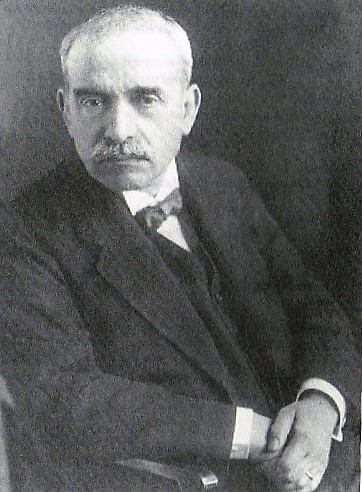 Foto